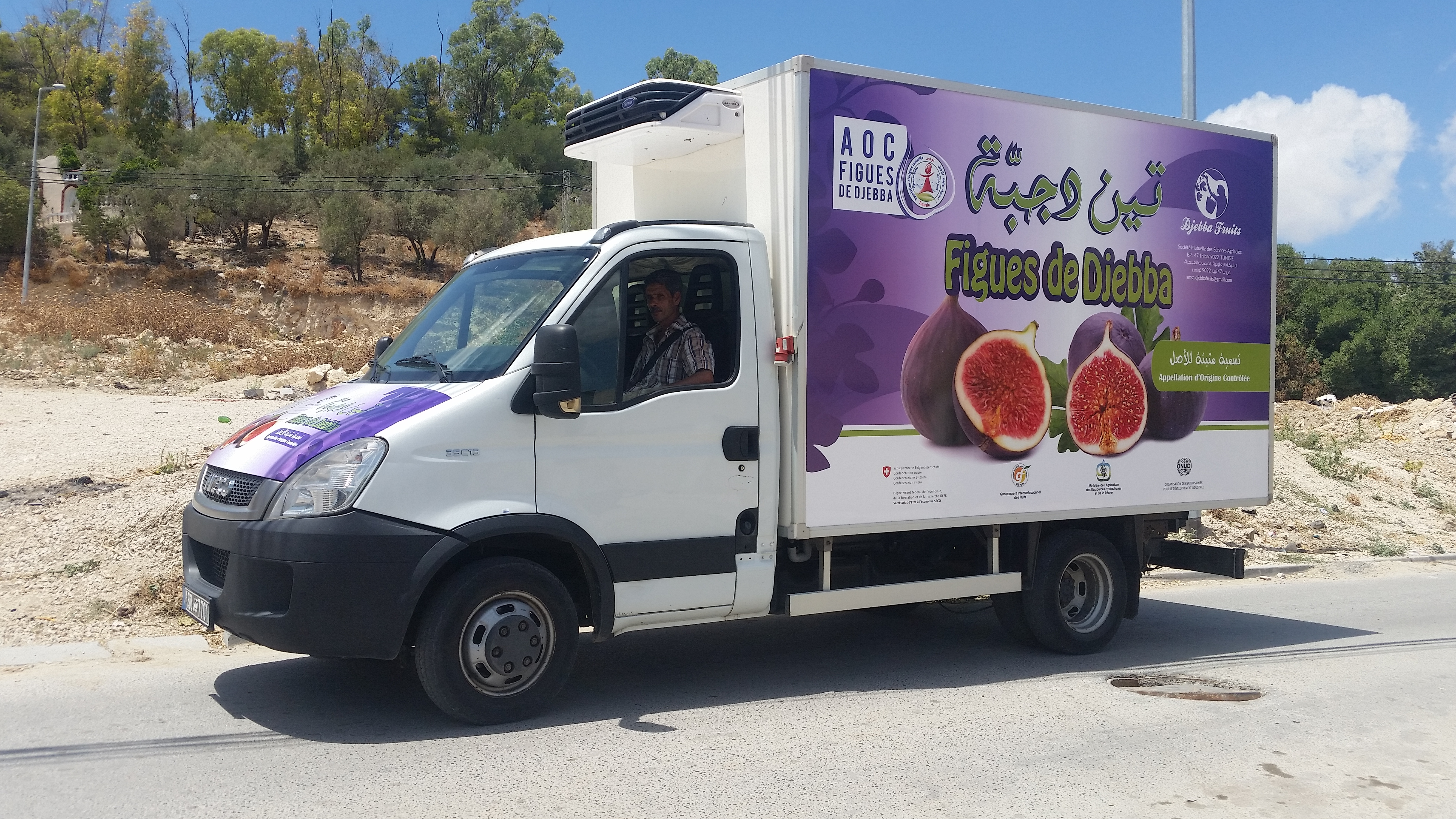 Djebba, un village où tout tourne autour de la figue